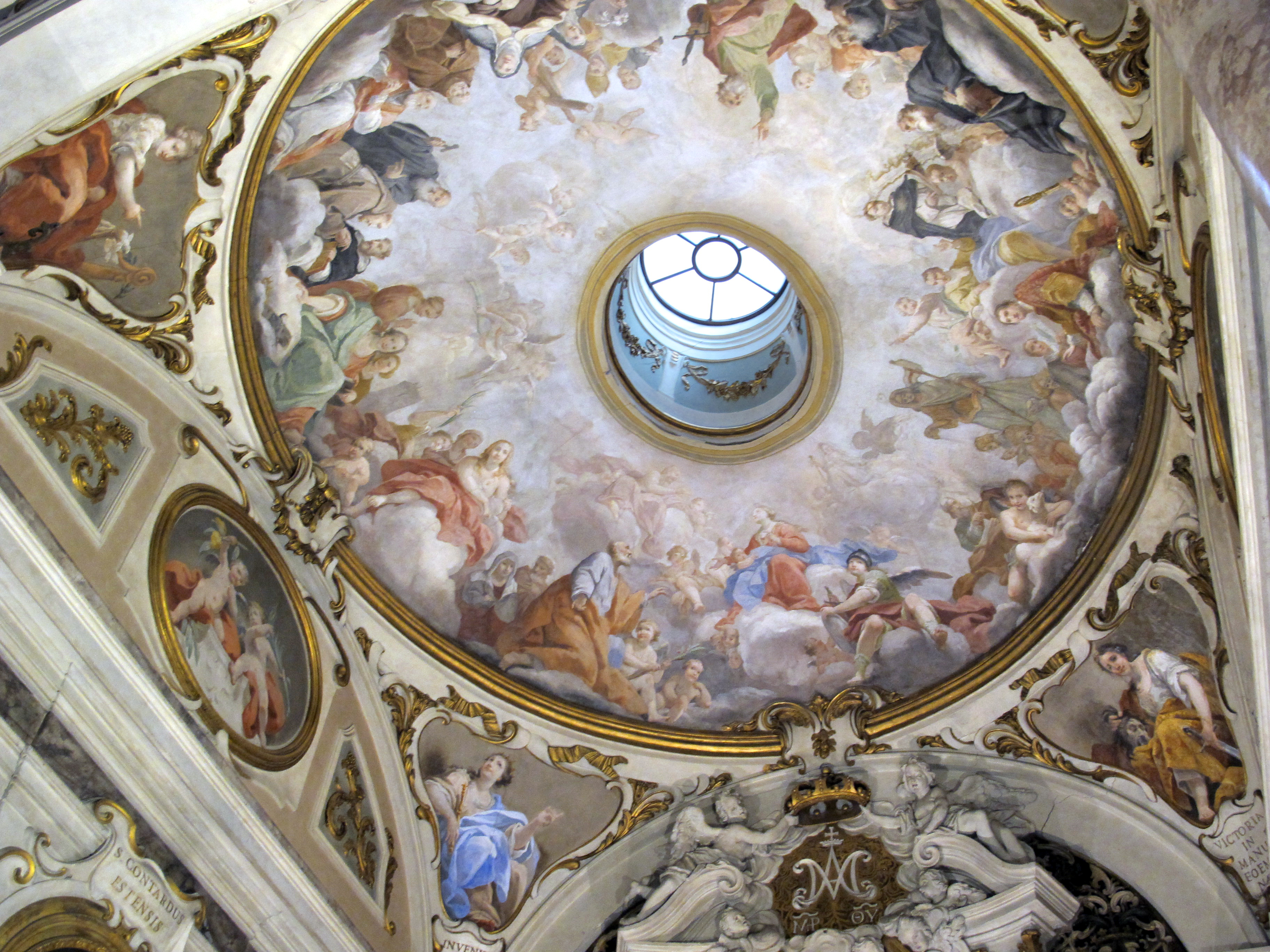 Santa Maria del Suffragio (Firenze)